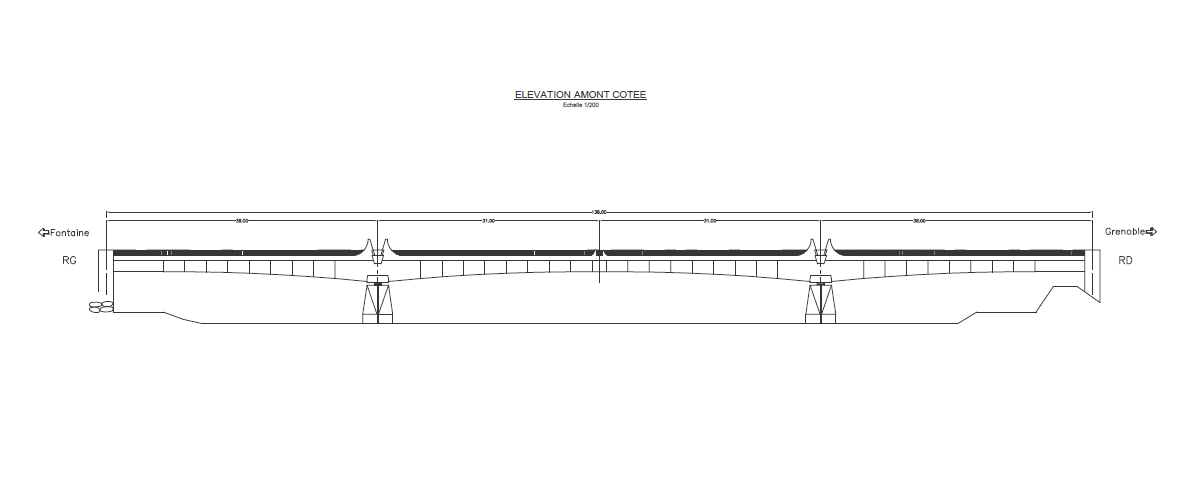 vue en elevation du pont esclangon